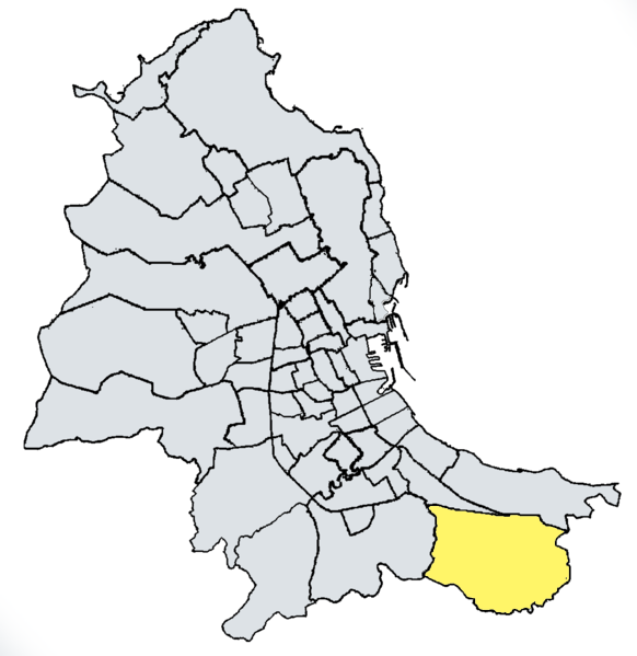 Ciaculli-Croce Verde